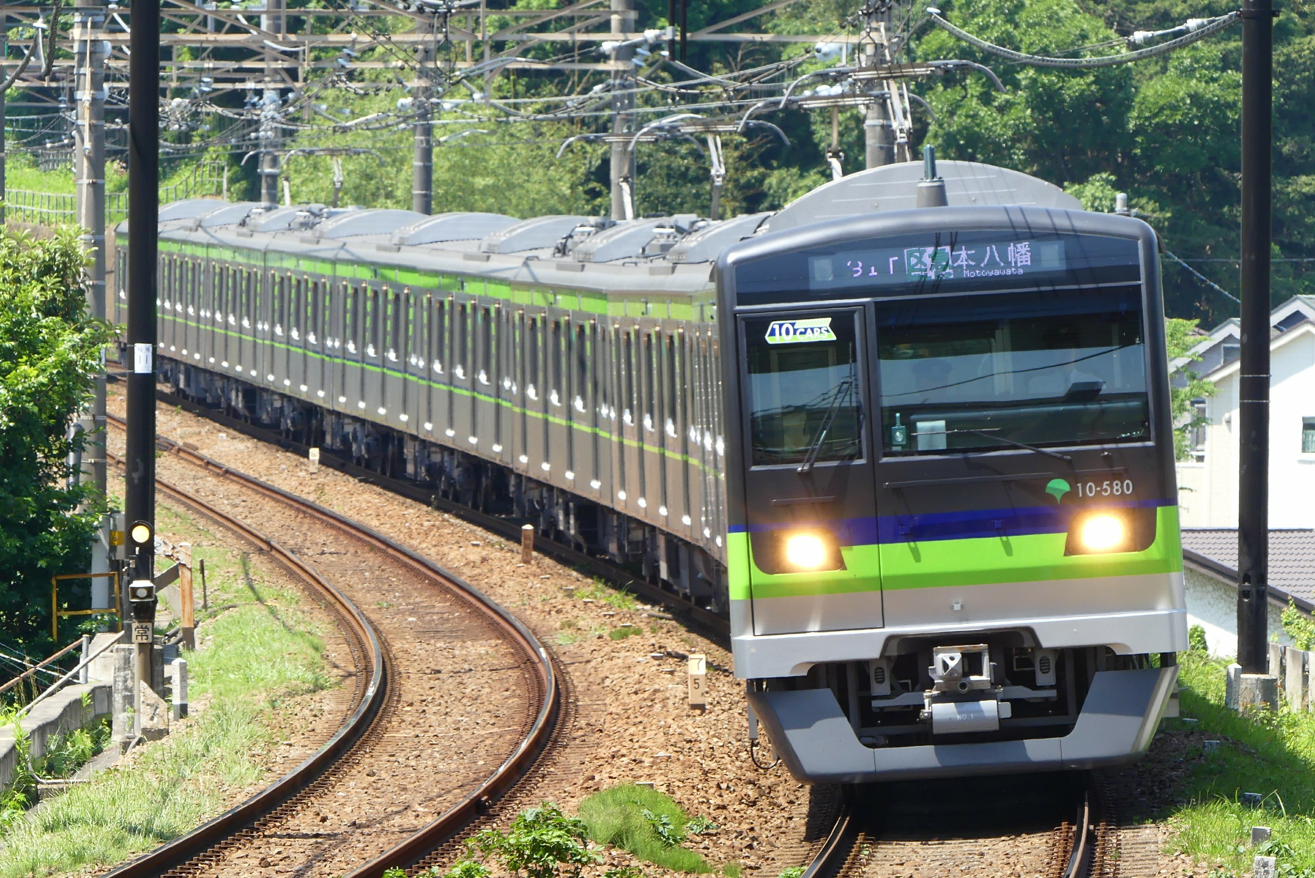 京王相模原線を走行する都営新宿線10-300形電車